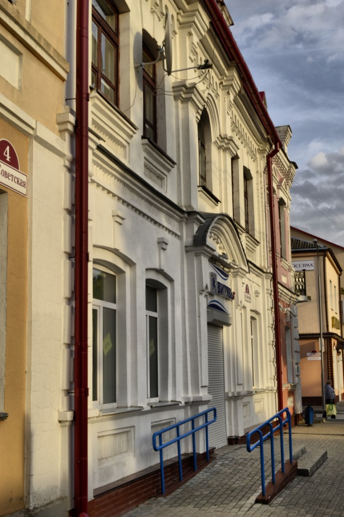 Беларуская (тарашкевіца): Гістарычны цэнтр г. Пінска: будынкі, збудаваньні, планіровачная структура, ландшафт і культурны пласт на тэрыторыі, абмежаванай з захадувул. Чарняхоўскага,з поўначы – вул. Завальнай, па мяжы дваровых тэрыторый дамоў № 1, 7,9, 11, 13, 19, 25, 27 па гэтай вуліцы, вул. Кірава, уключаючы дваровыя тэрыторыі дамоў № 1, 13 па вуліцы Кірава, з усходу – вул. Савецкай, у тым ліку дома № 5 па вул. Іркуцка-Пінскай Дывізіі, дома № 2 па вул. Кулікова, дома № 3 на пл. Кастрычніка, памяжы дваровых тэрыторый забудовы няцотнага боку дамоў № 1, 3па вул. Кіеўскай, да перакрыжаваньняз вул. Альхоўскіх, ад перакрыжаваньня з вул. Дняпроўскай Флятыліі,па вул. Дняпроўскай Флятыліі, уключаючы дваровыя тэрыторыі дамоў№ 39, 41 гэтай вуліцы, з поўдня —левым берагам р. Піна да перасячэньня з вул. Чарняхоўскага. г. Пінск This is a photo of Belarusian heritage monument. Reference number: 112Е000529 ( WLM)